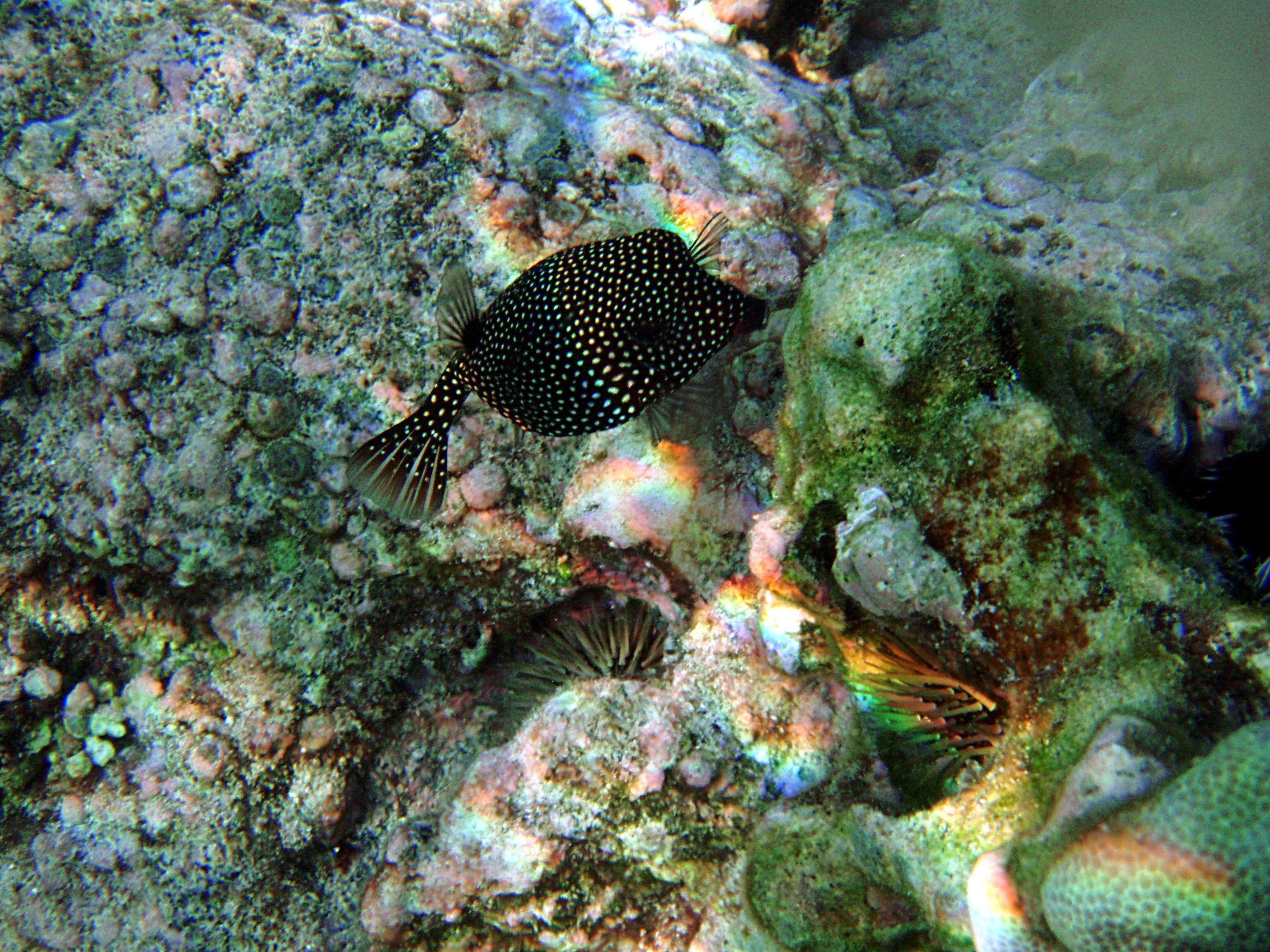 Weißpunkt-Kofferfisch (Ostracion meleagris), female or juvenil